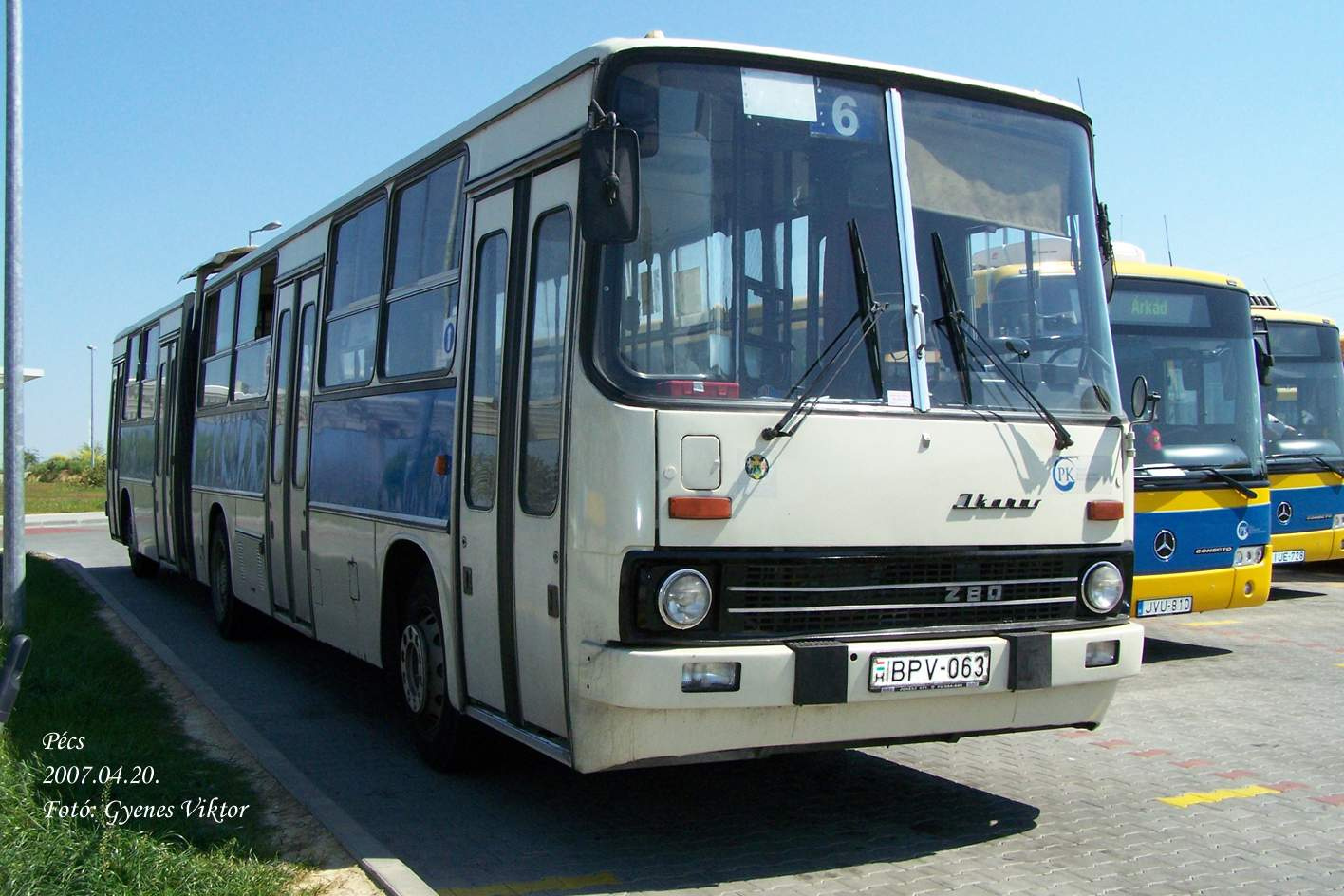 Ikarus 280-as Pécsett a 6-os vonalon